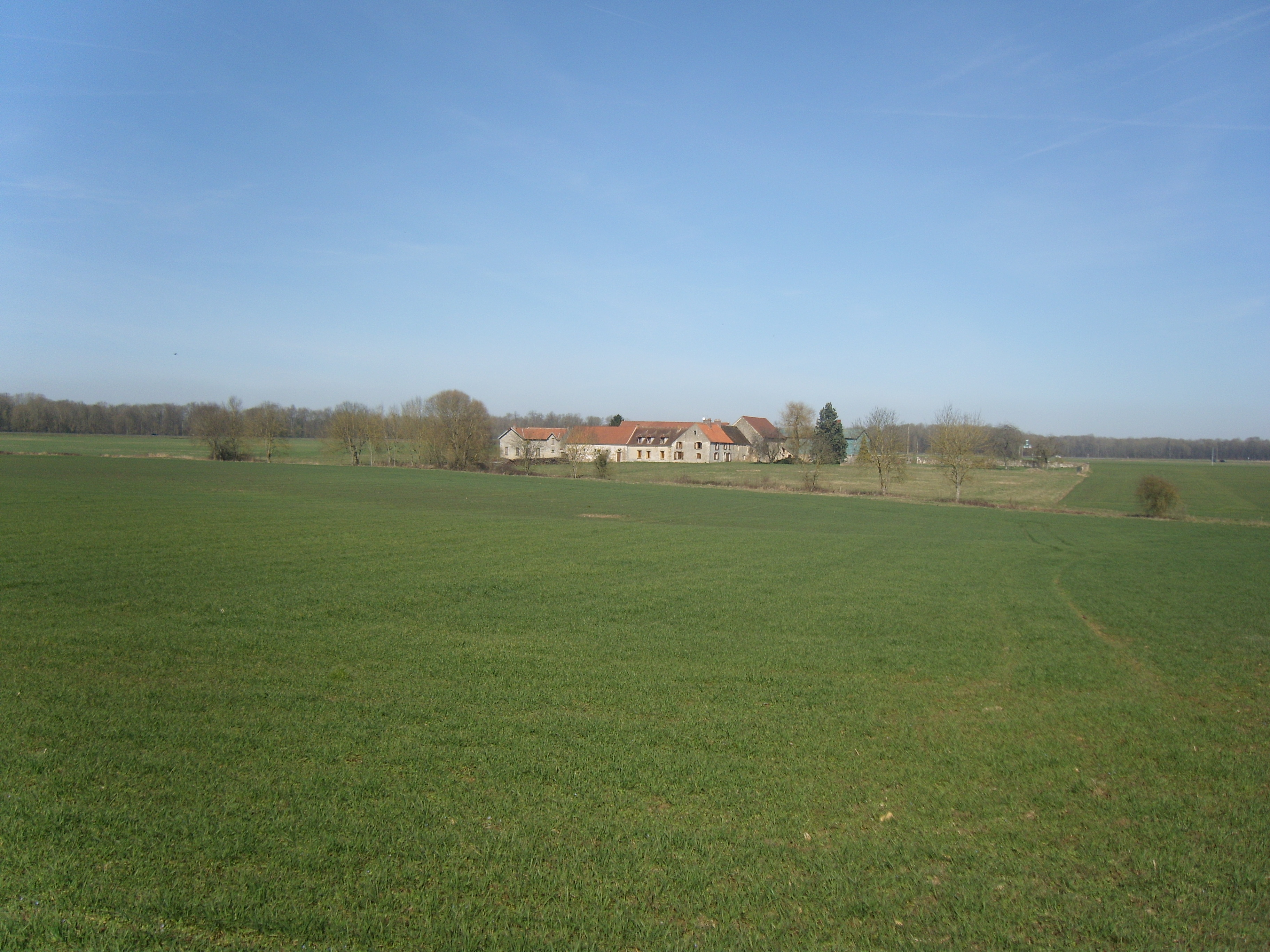 Ferme de Lognes et Bréon